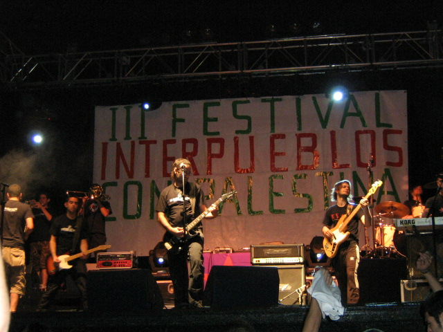 Concierto celebrado en Leganés (madrid) con motivo del III Festival Interpueblos, organizado por la Asociación Cultural Haydée Santamaría (